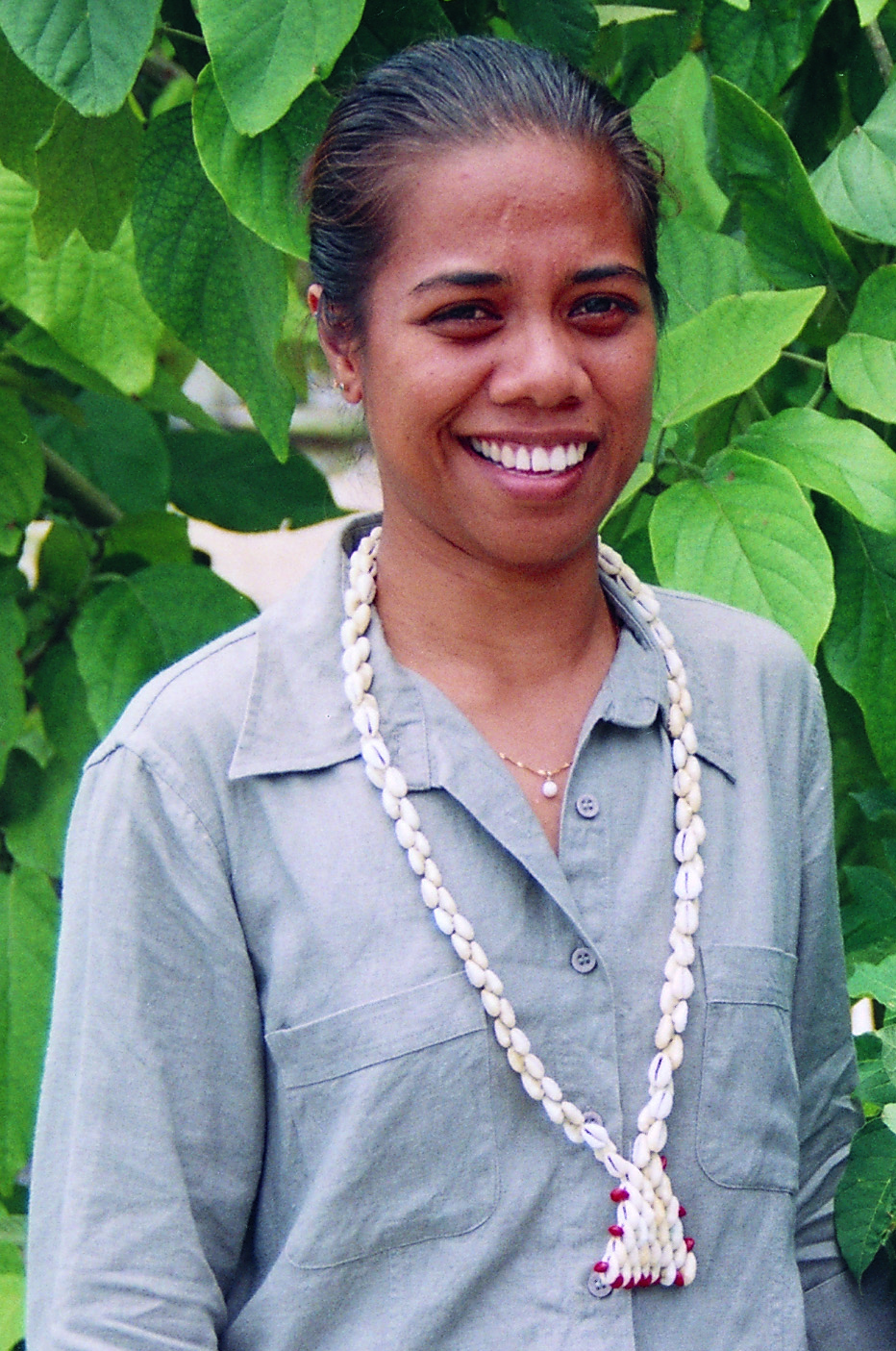 Tuvalu's first female doctors. Tuvalu 2008.